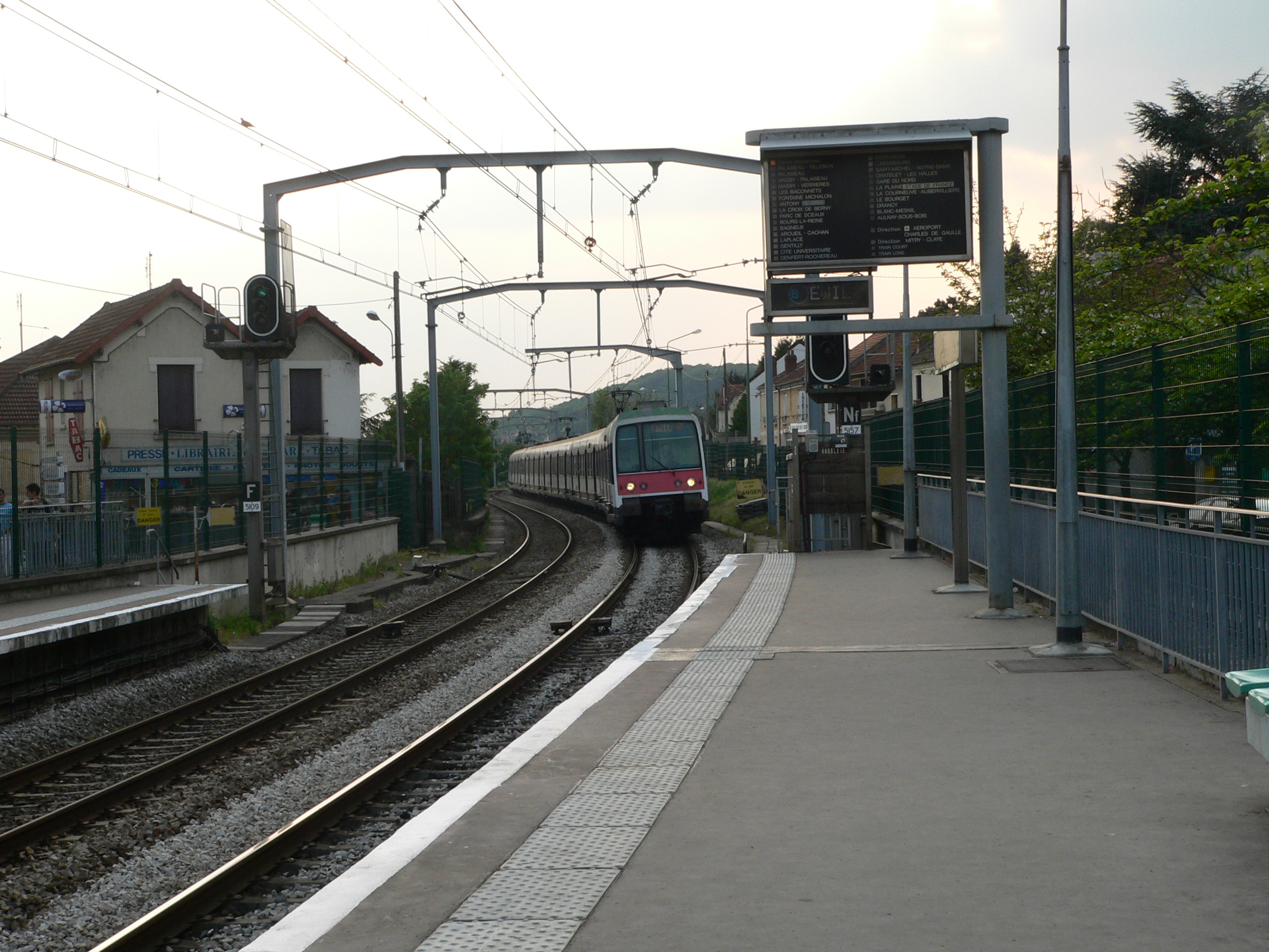 Paris RER B, Lozère station